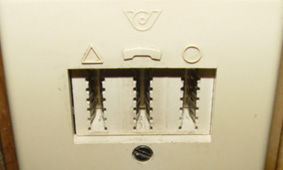 Aufputz-Telefonsteckdose (TDO) der ehemaligen Post u. Telegraphenverwaltung (PTT) Austria-Österreich